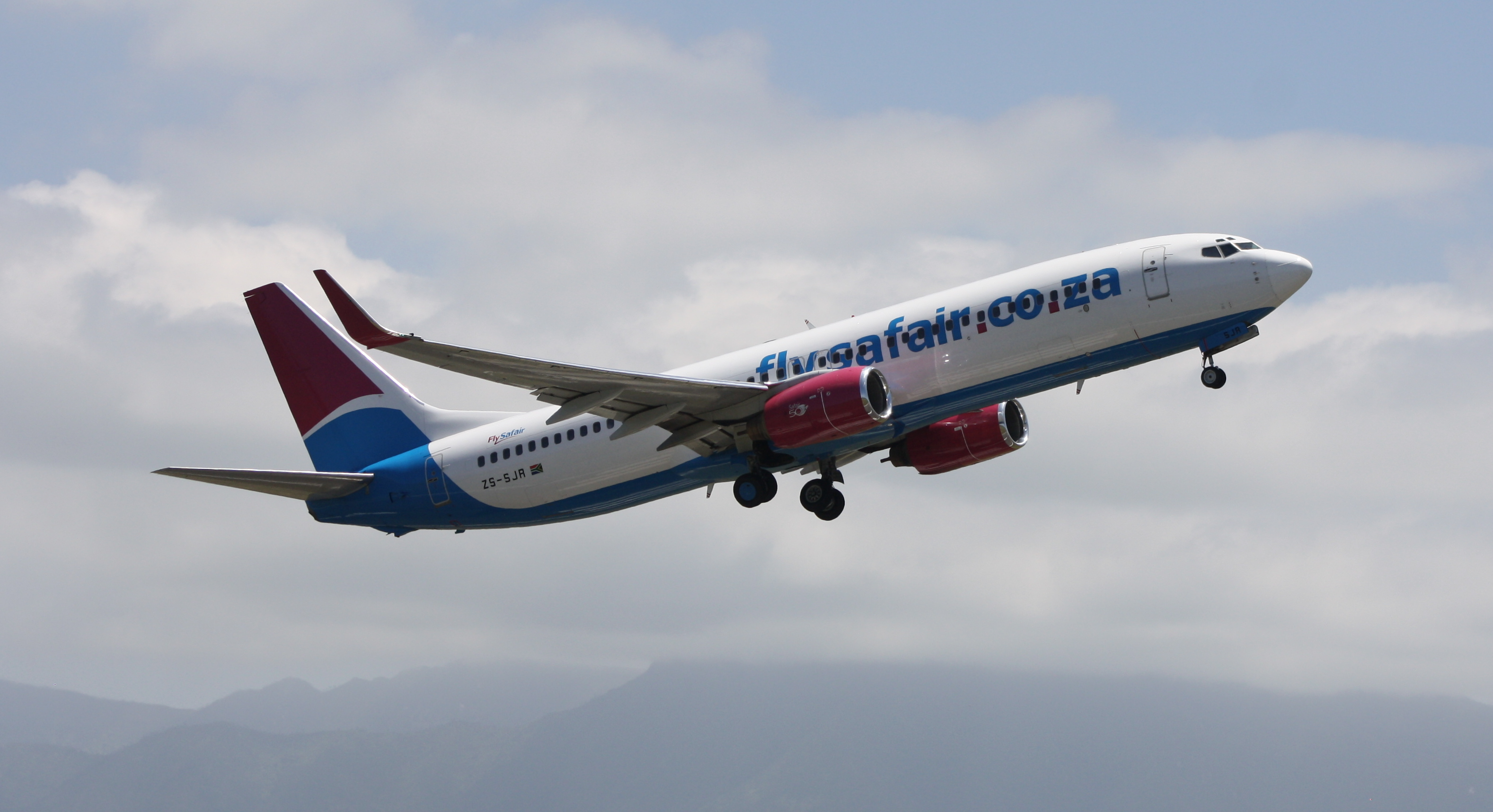 FlySafair B737-844 ZS-SJR